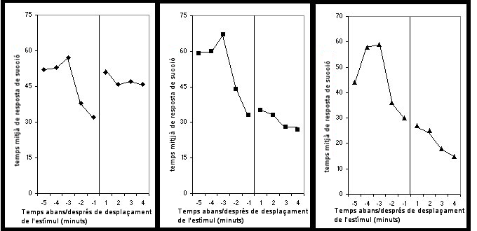 Gràfica del temps de succió d'infants en experiment de fonologia